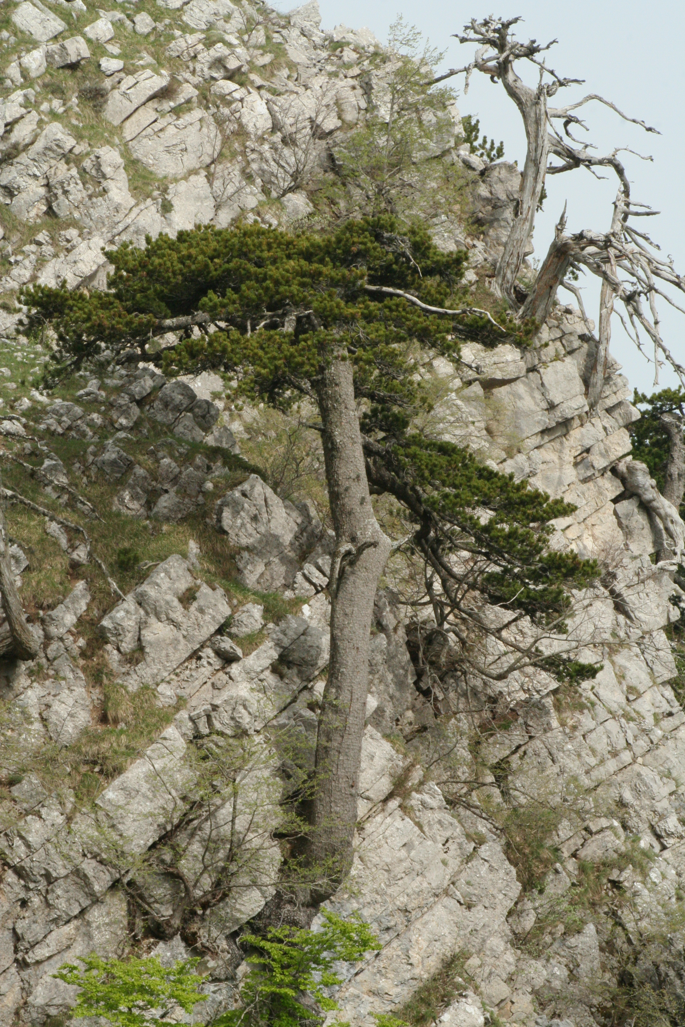 Pino loricato (Pinus heldreichii), Parco del Pollino - Italy